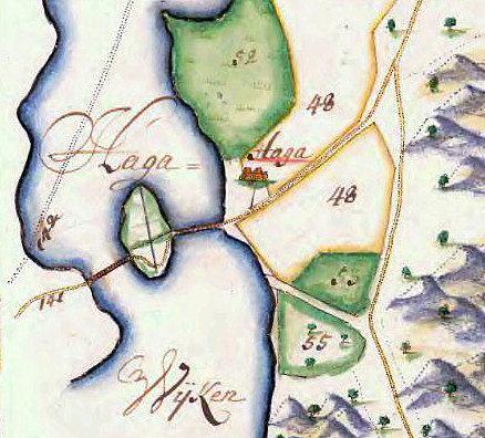 Del av General Carta öfwer Vårby säteri 1703 med Haga gård och Hagaviken